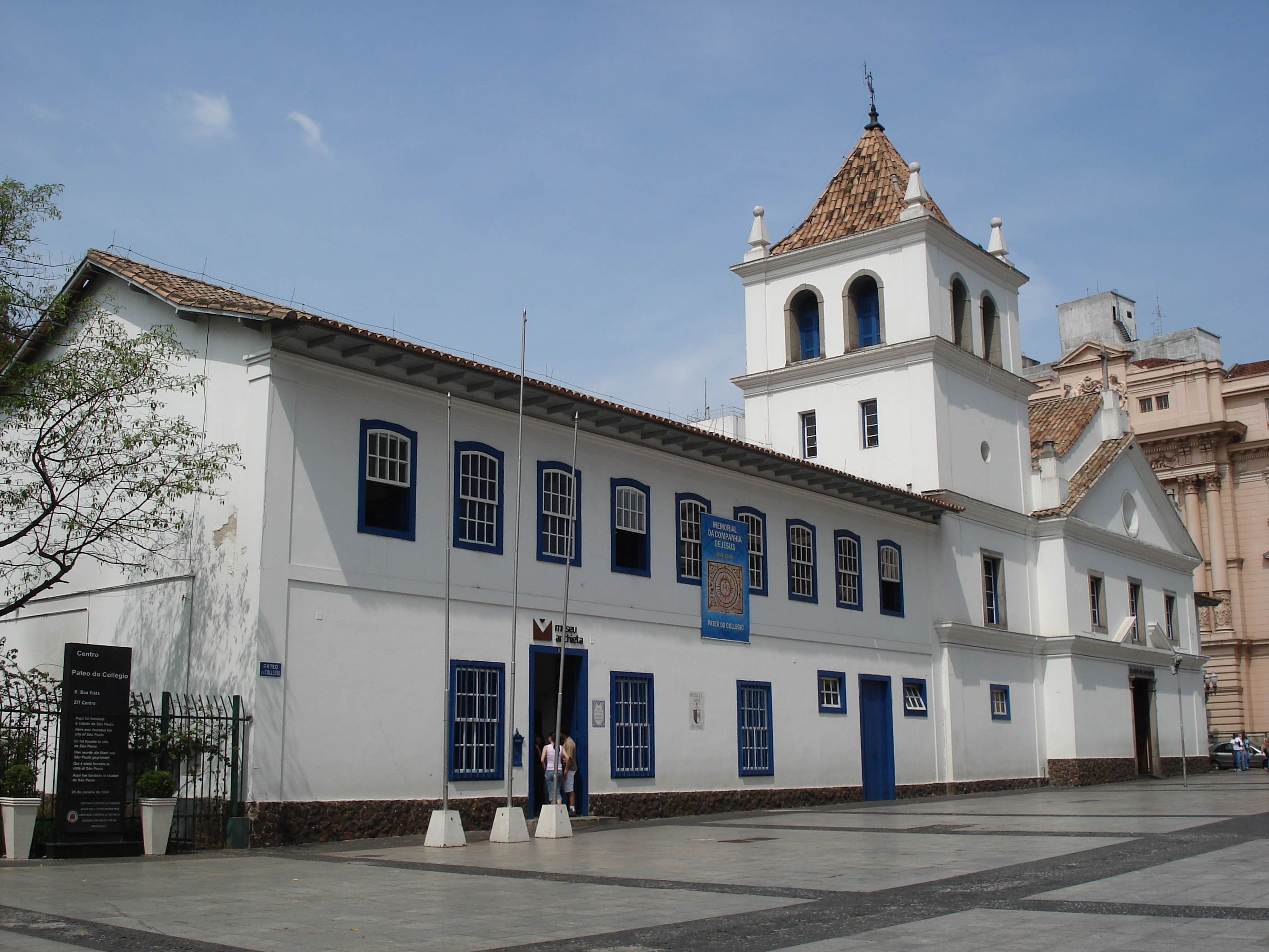 O Pátio do Colégio em São Paulo, Brasil.